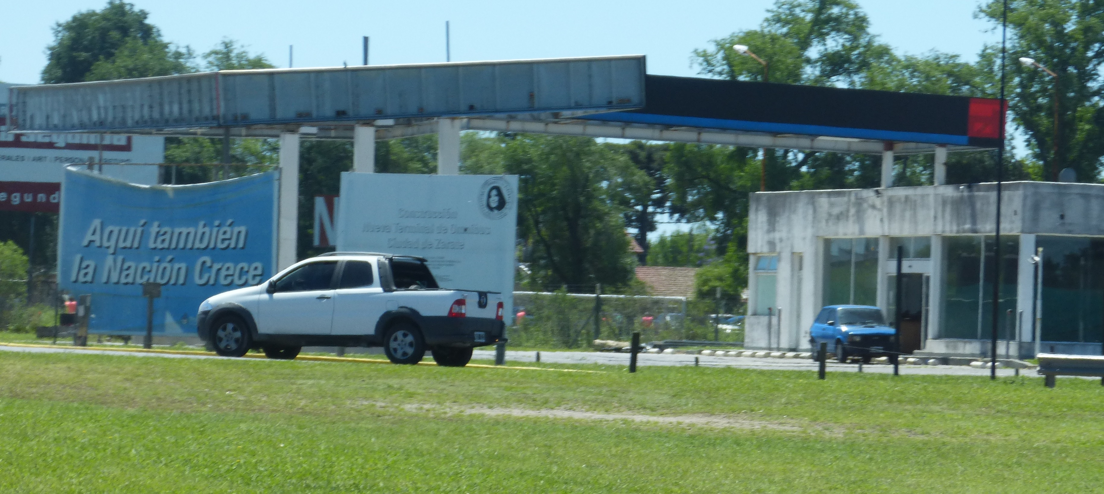 En las proximidades de Campana, una estación EG3 abandonada